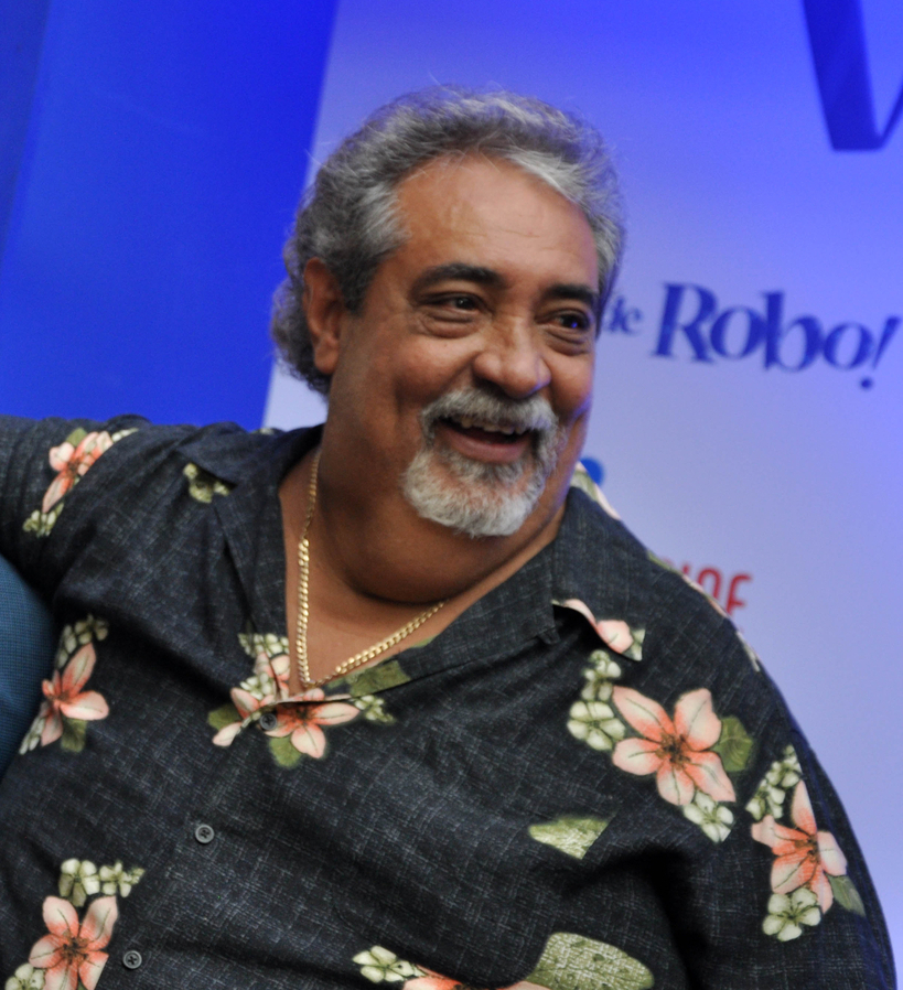 El cantante dominicano Anthony Rios.